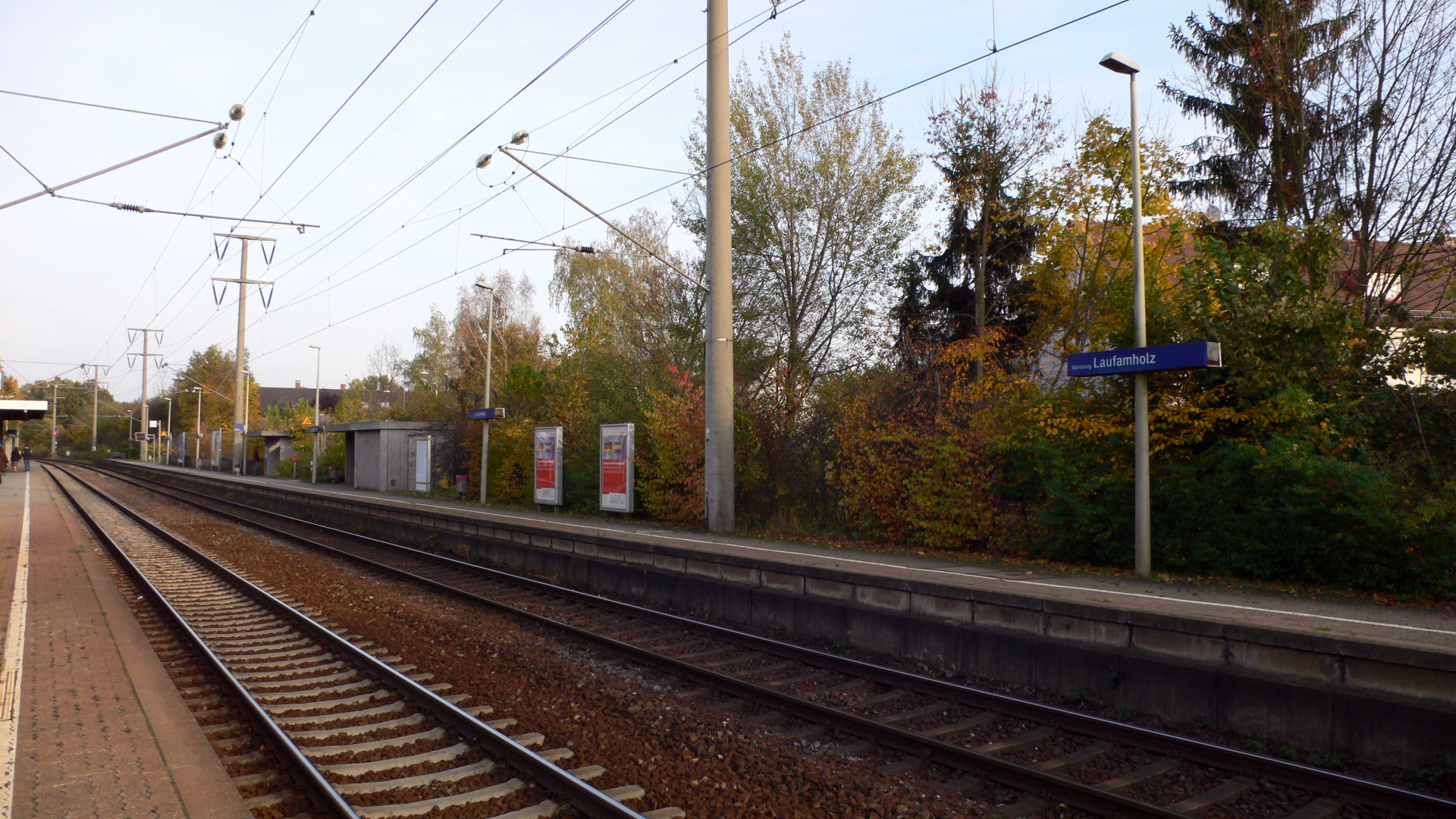 Haltepunkt Nürnberg-Laufamholz, Blick auf den Bahnsteig Richtung Lauf (links Pegnitz)